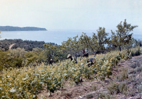 Weinanbau am Südhang des Toumba, etwa 1km OSO von Limenaria (1957)